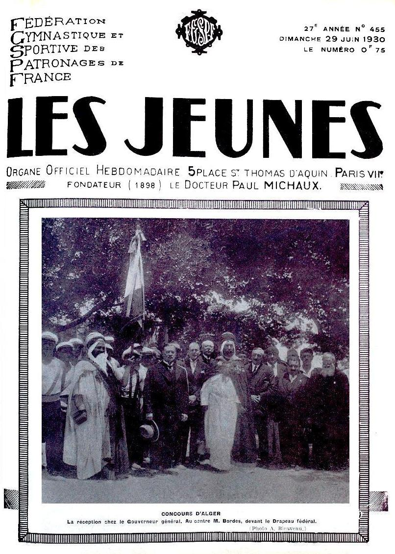 Couverture de la revue fédérale de la Fédération gymnastique et sportive des patronages de France